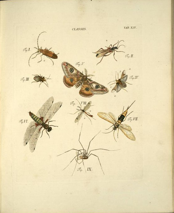 Plate from Elementa entomologica.